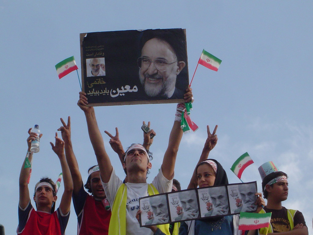 Anhänger des Reformers Mustafa Moins im Wahlkampf der iranischen Präsidentschaftswahlen 2005 mit einem Plakat des reformerischen Präsidenten Mohammed Chatami